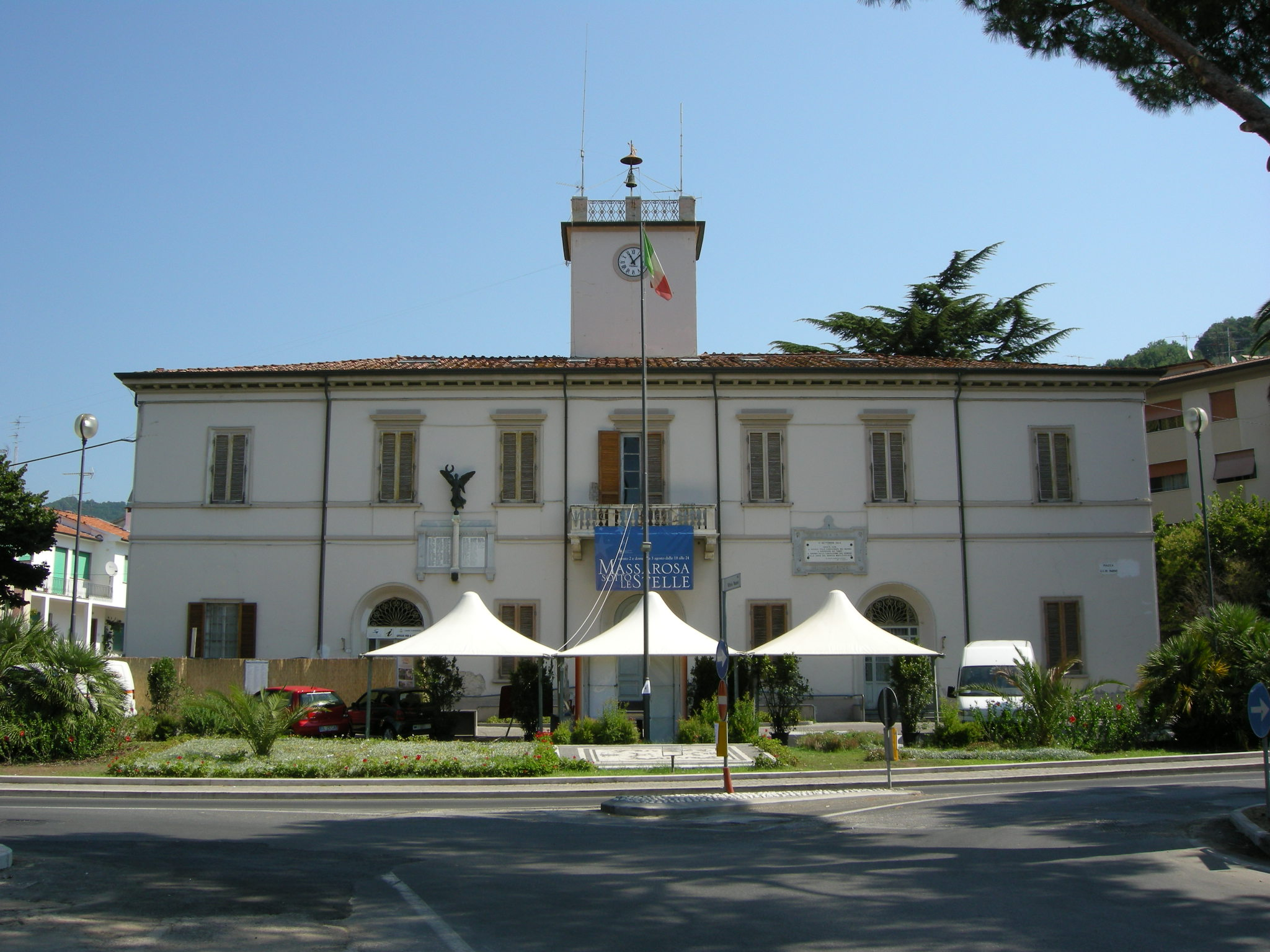 Comune di massarosa